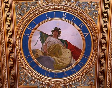 Cesare Maccari, Senato della Repubblica